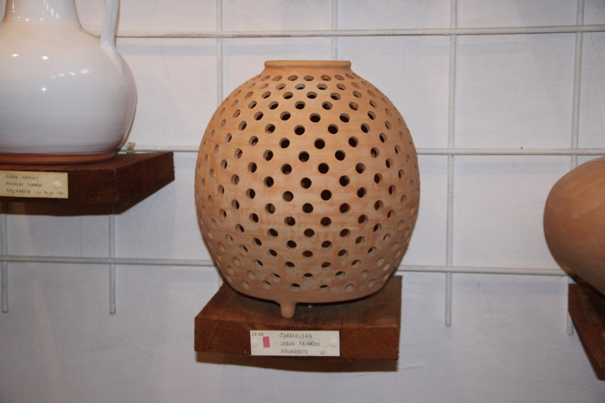 Alfareria típica de Navarrete (La Rioja, España): Caracolera, pieza seriada según un diseño original del alfarero Jesús Fajardo. Museo de Cerámica de Chinchilla de Montearagón (Albacete).